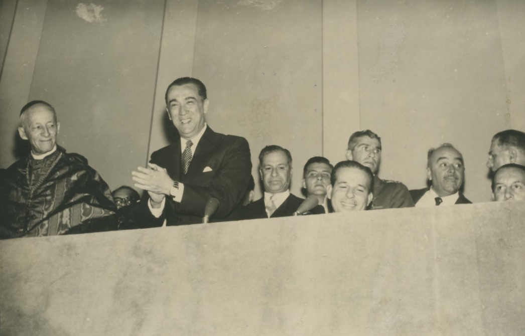 Fotografia do Fundo Correio da Manhã, sob a guarda do Arquivo Nacional.